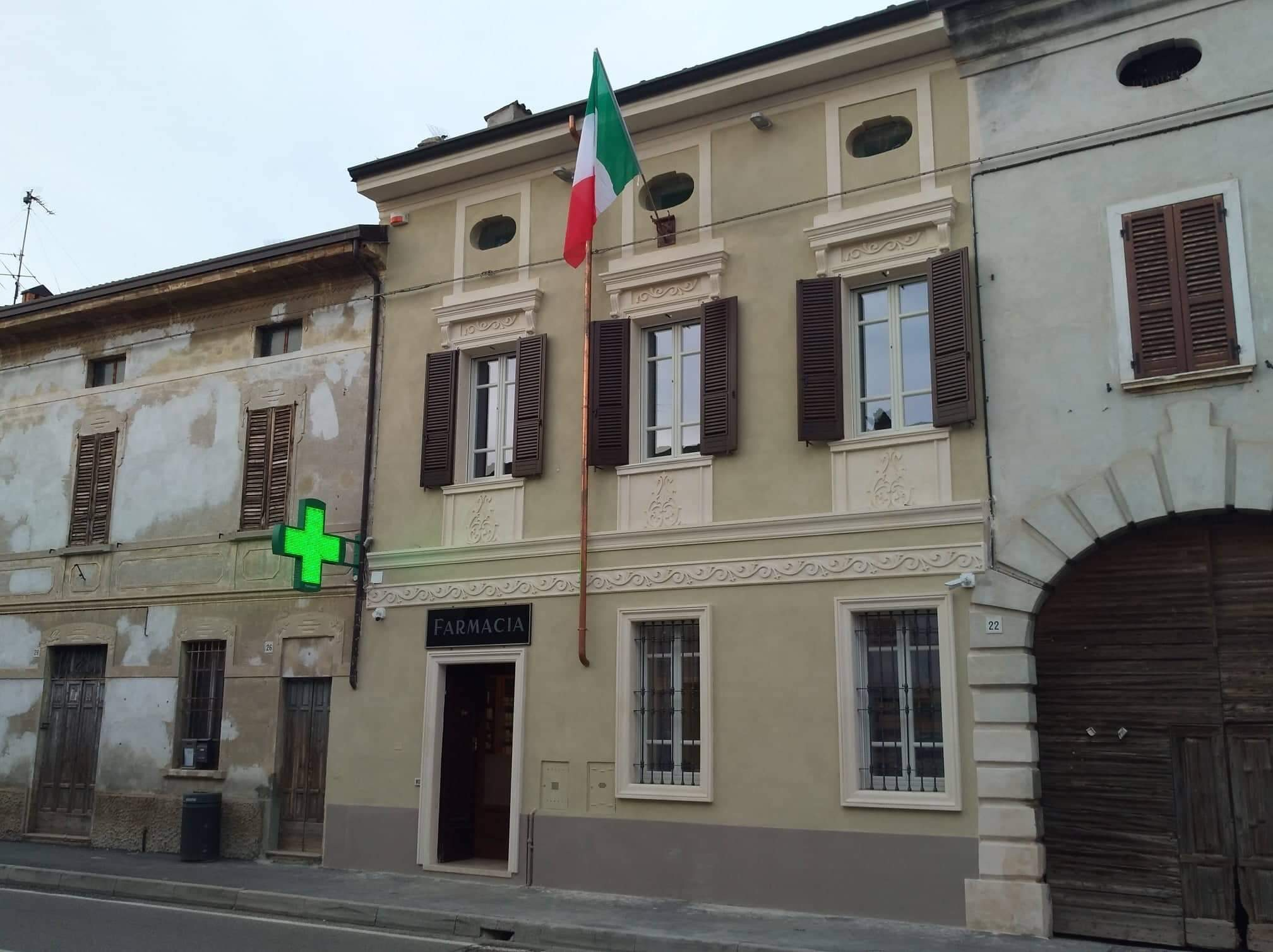 Facciata della farmacia galassi